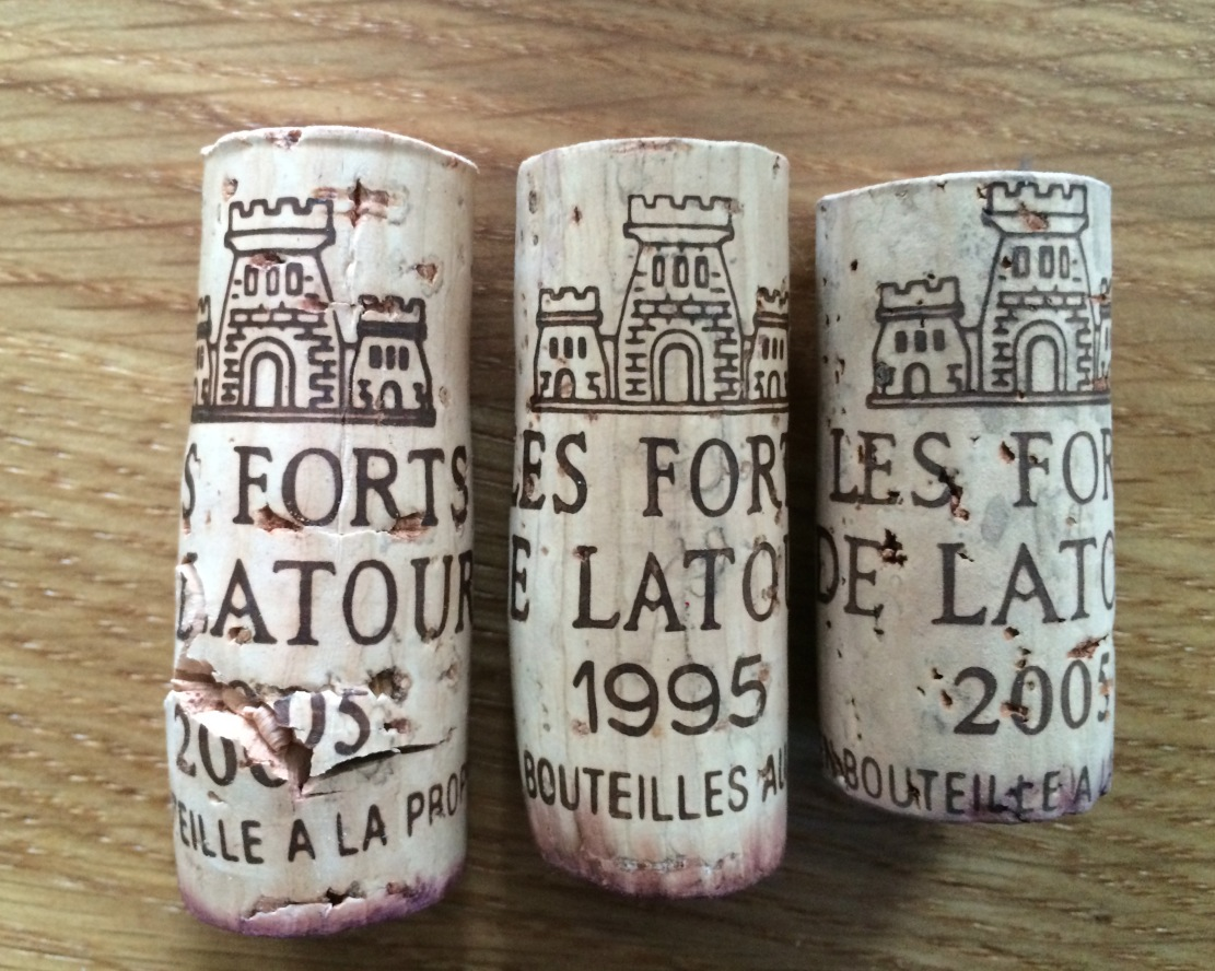 Unterschiedlich lange Korken des gleichen Weins/Jahrgangs.